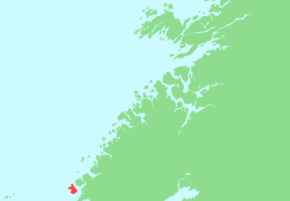 Locator map of Linesøya, Sør-Trøndelag, Norway